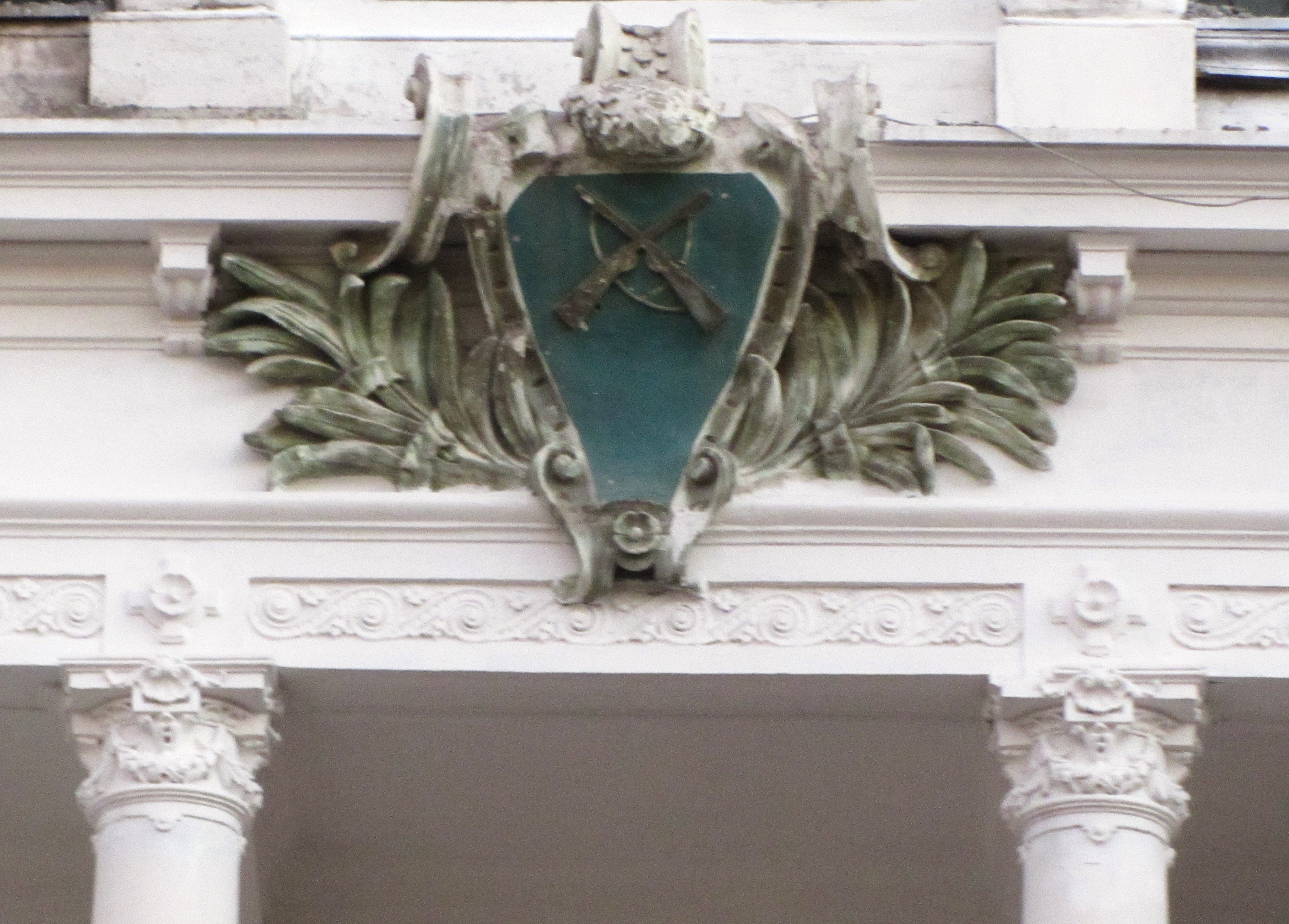 Palacio Polanco, Valparaíso, Chile Detalle del escudo de Carabineros de Chile